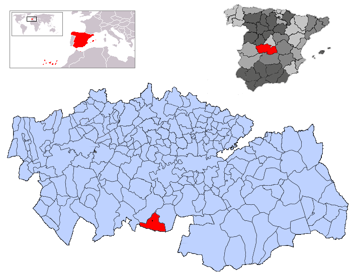 San Pablo de los Montes en la provincia de Toledo